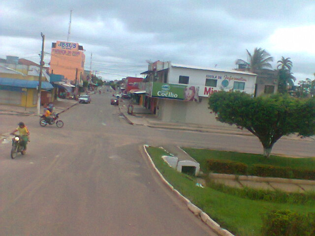 Cidade de Breu Branco